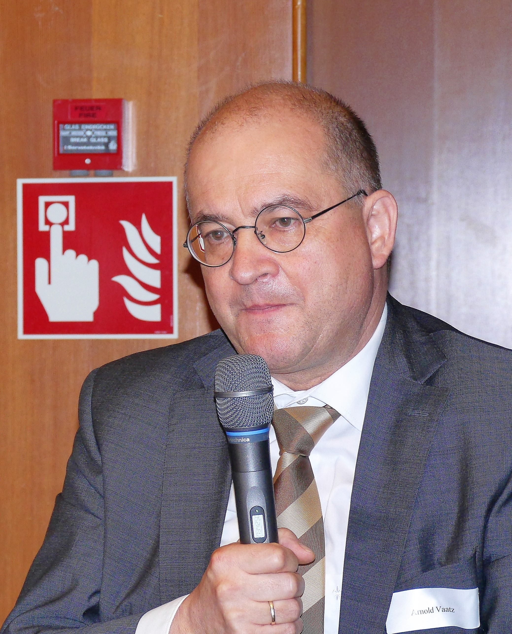 Arnold Vaatz, Mitglied des Deutschen Bundestages, auf einem Forum in Dresden am 1.11.2016